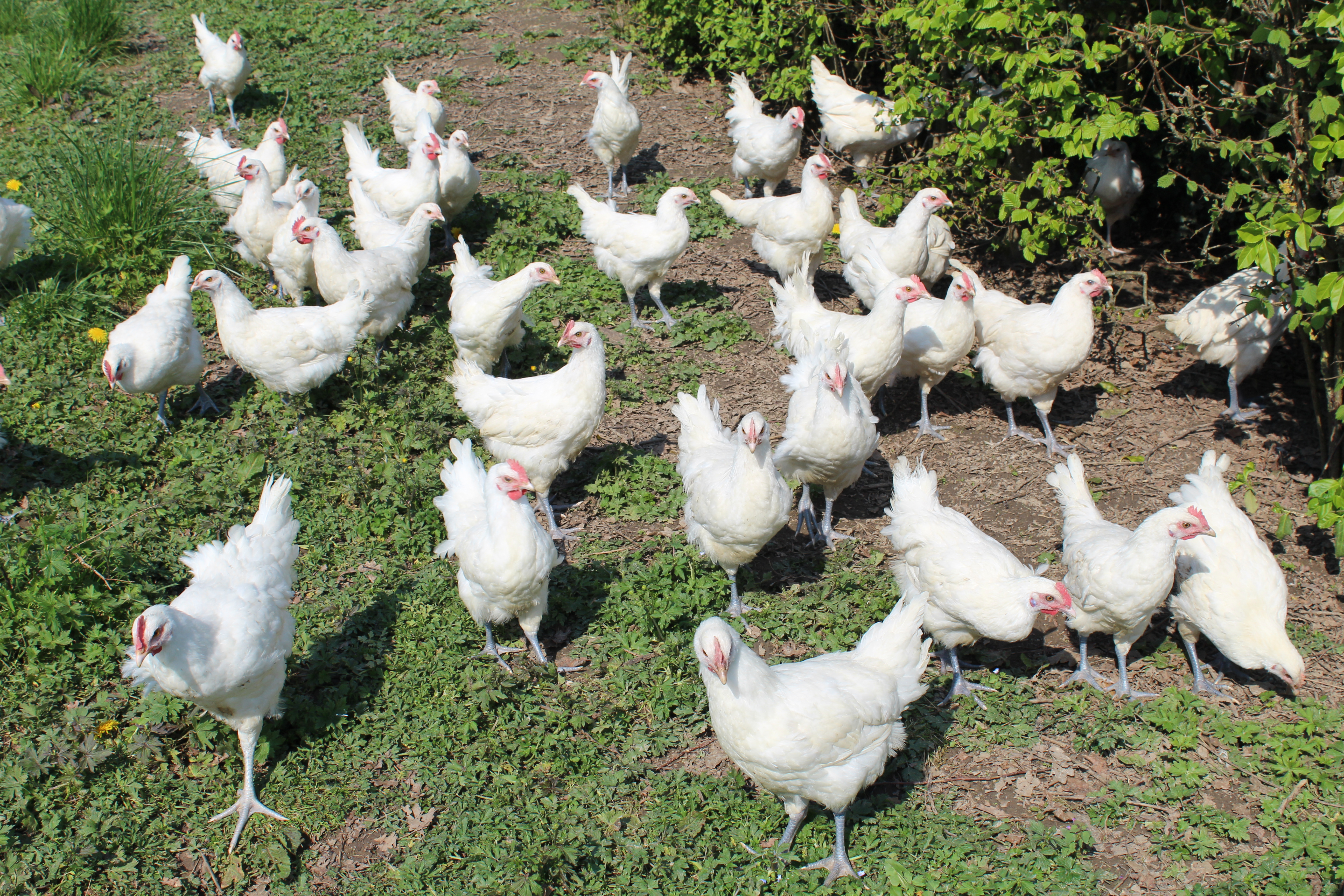 Poules de Bresse dans l'aire avicole du Domaine des Planons, Saint-Cyr-sur-Menthon.